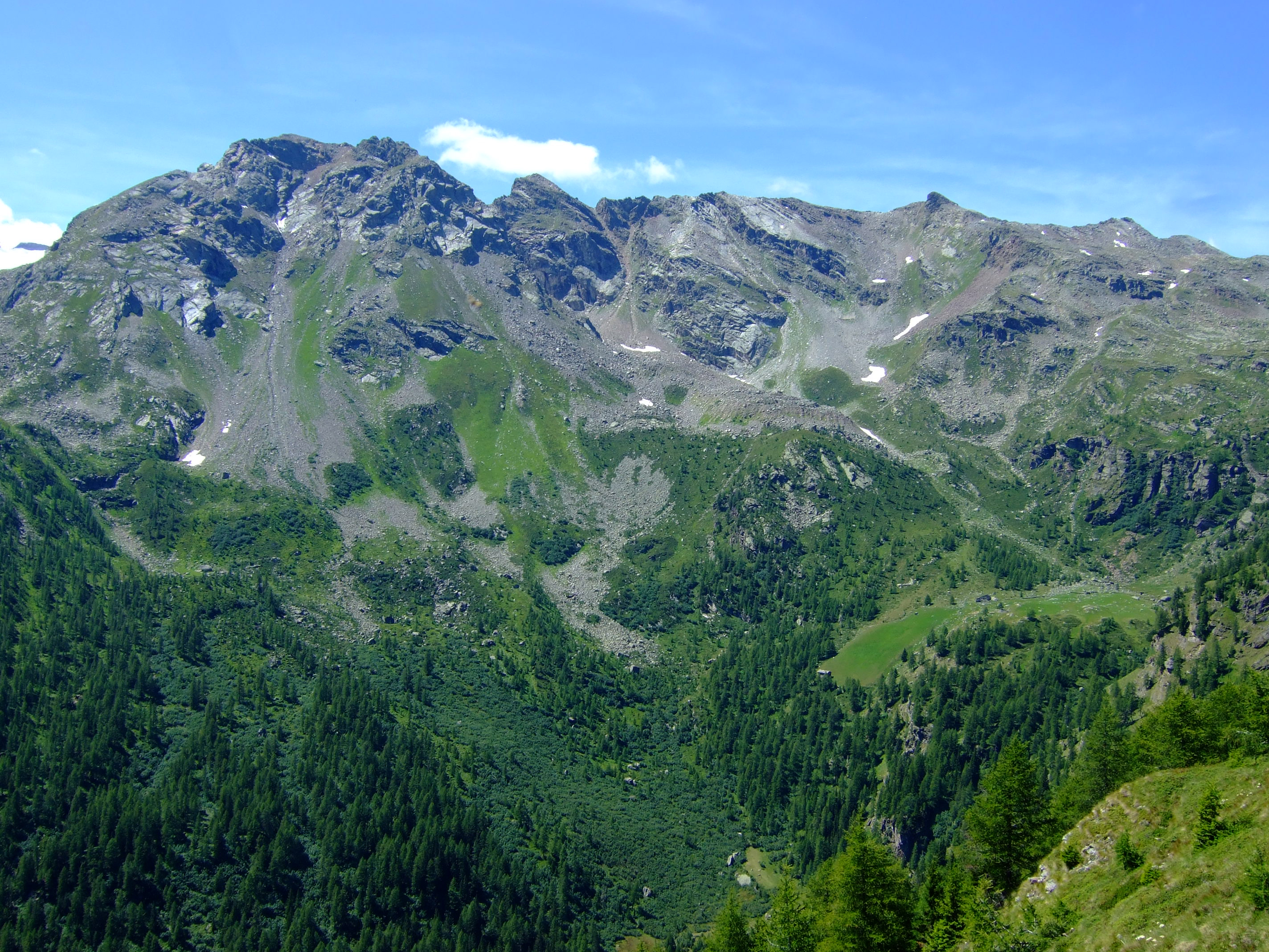 Der Corno Campascio und der Piz Canfinal von Somdoss aus gesehen, August 2009